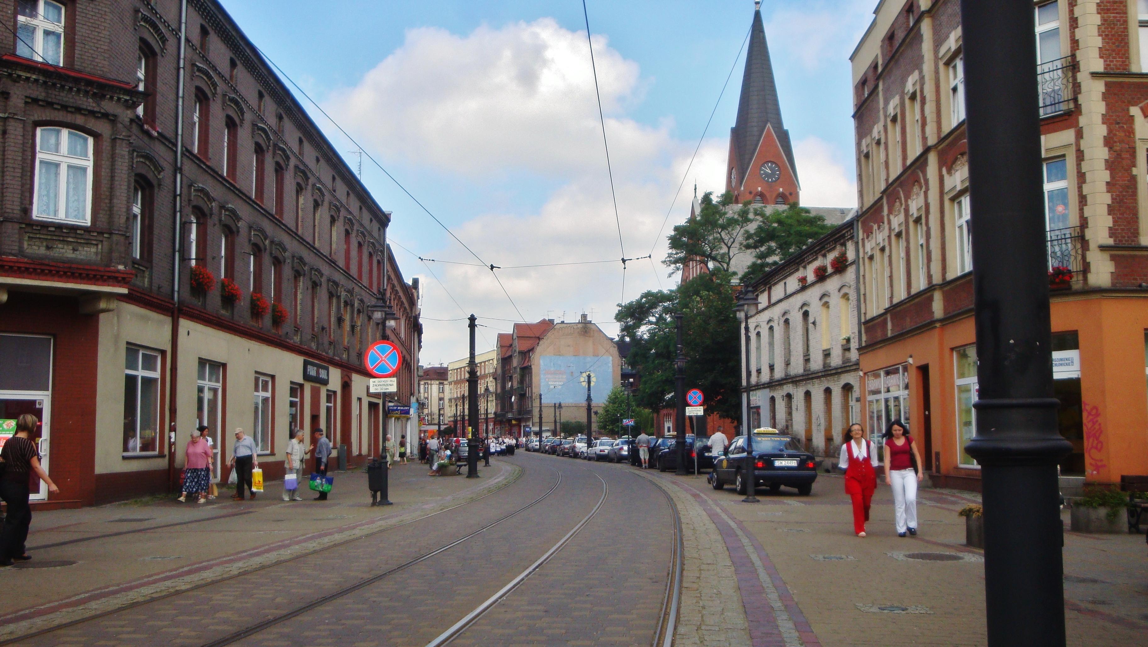 ulica Katowicka